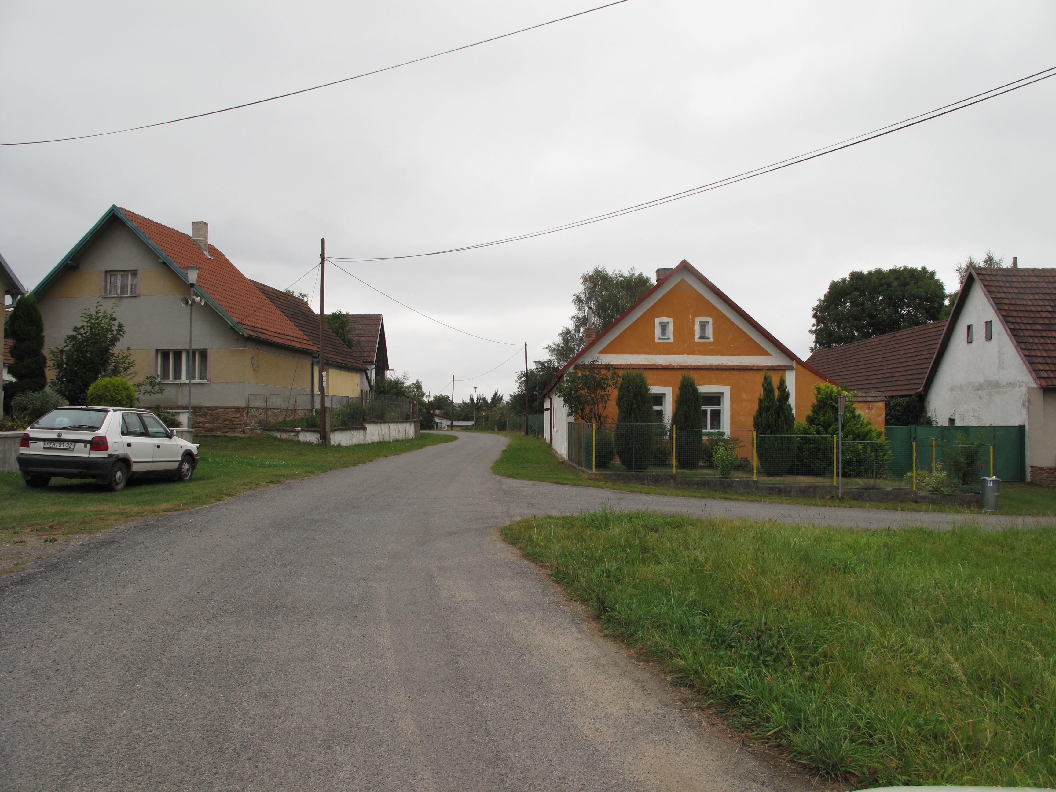 Cesta ve Velké Vsi. Okres Pelhřimov, Česká republika.